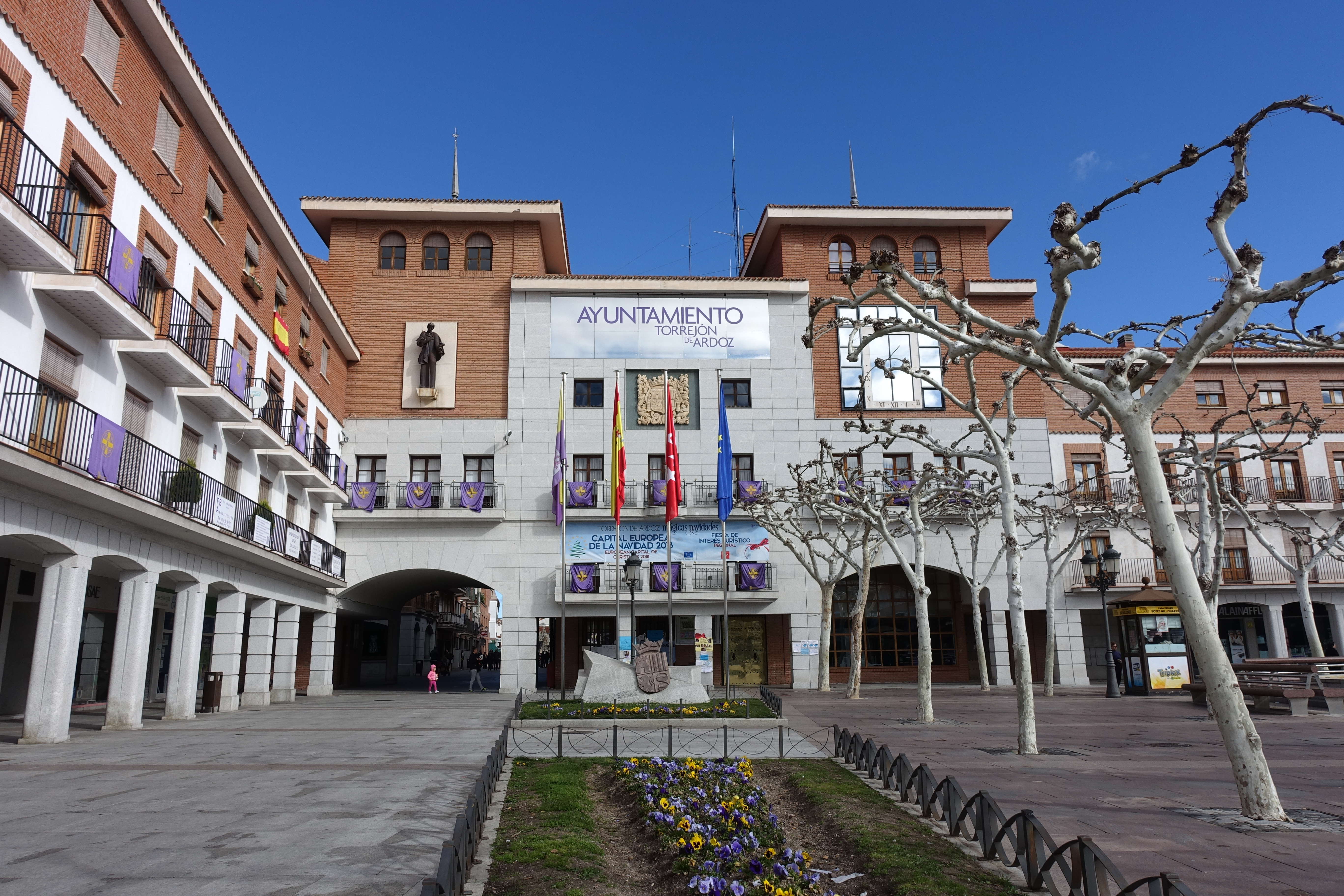 Casa consistorial de Torrejón de Ardoz (Madrid, España).